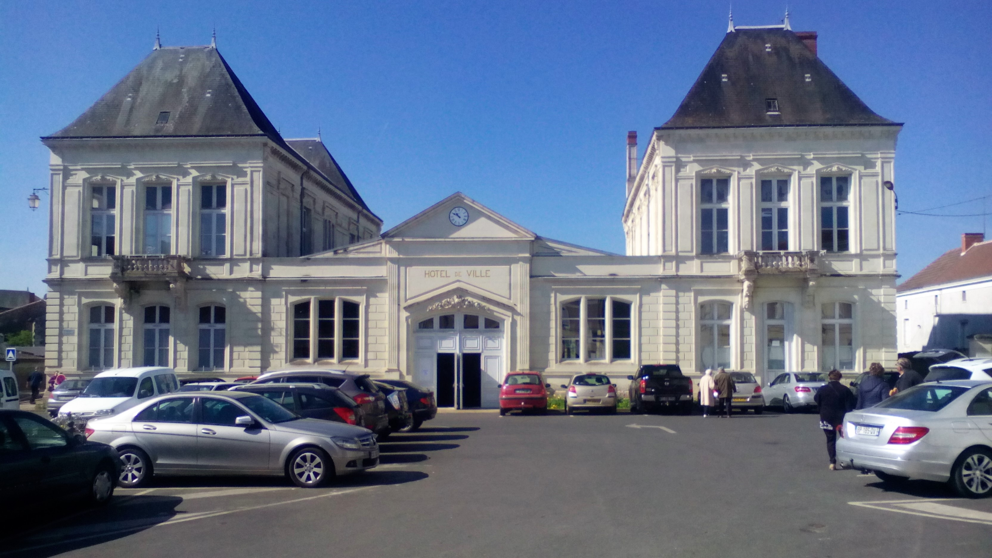 Hôtel de ville de Lencloître (86140, France), le 23 avril 2017